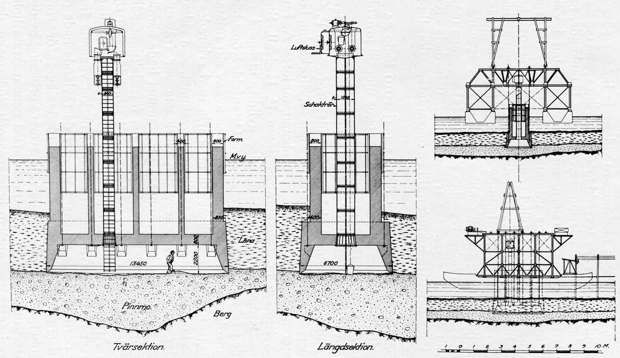 Årstbron, konstrultionsritning, grundläggning av pelare under vatten med kassun